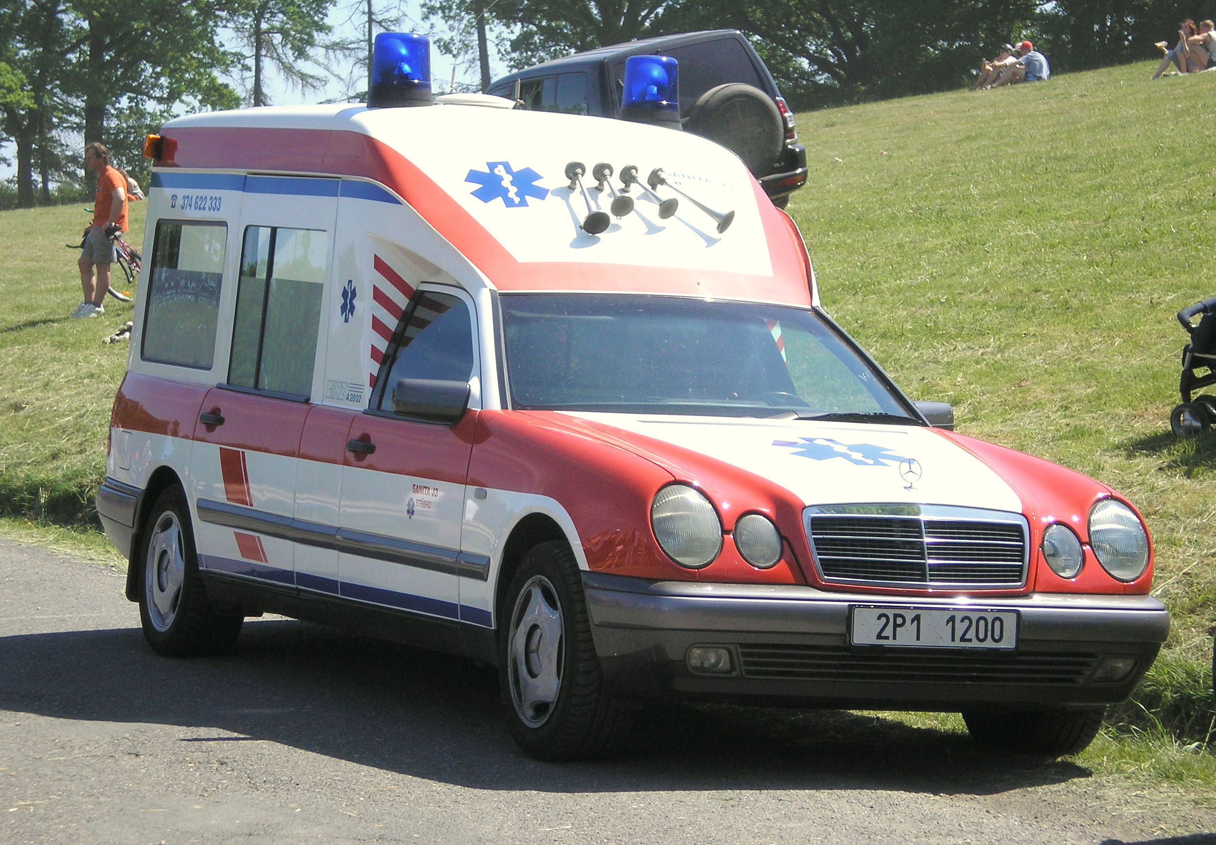 Czech Ambulance